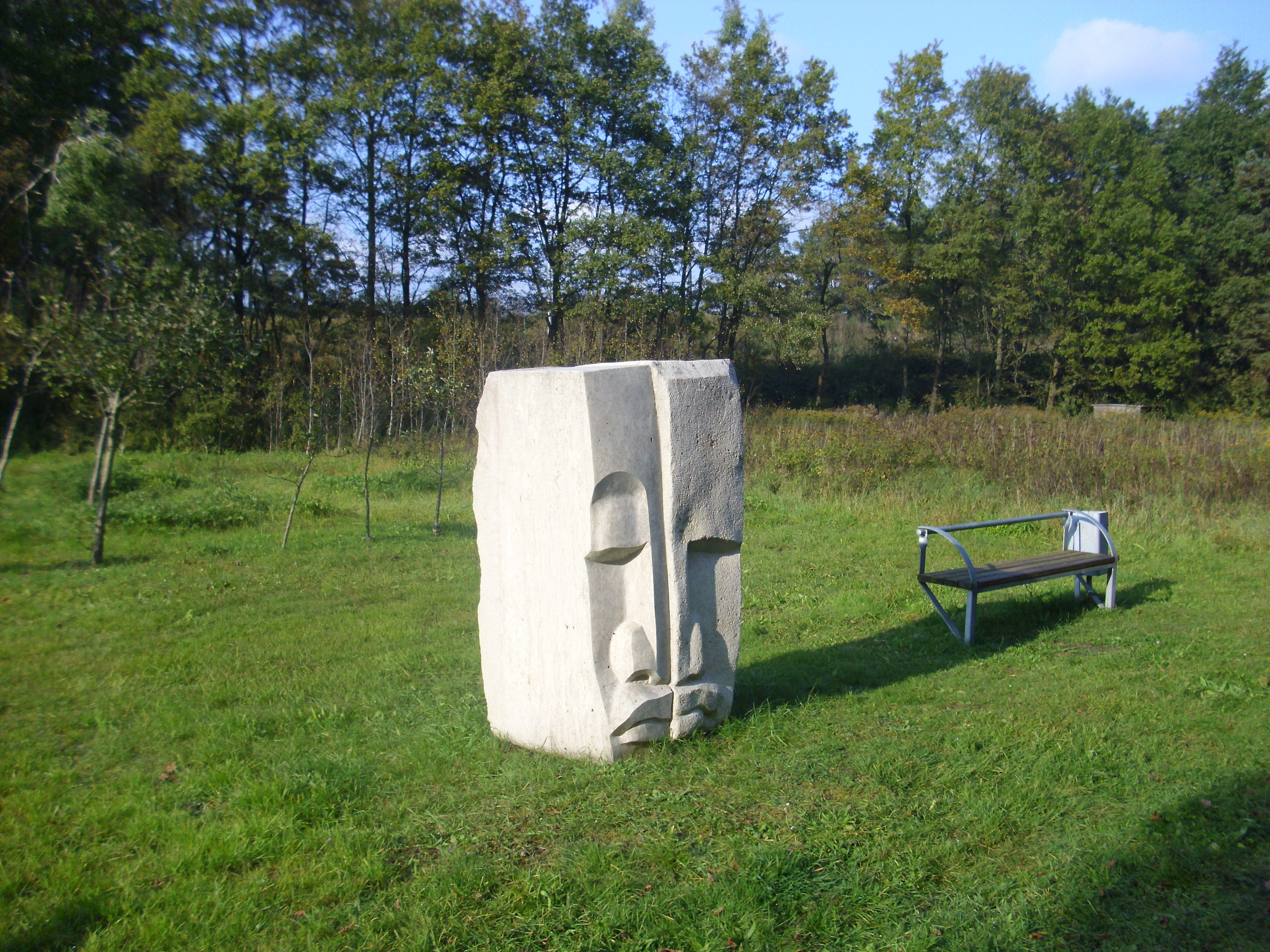 Die Skulptur "Maske Spirit Lovers" von Bakari Josia Manzi aus Simbabwe als Teil des Skulpturenweges von Georgensgmünd